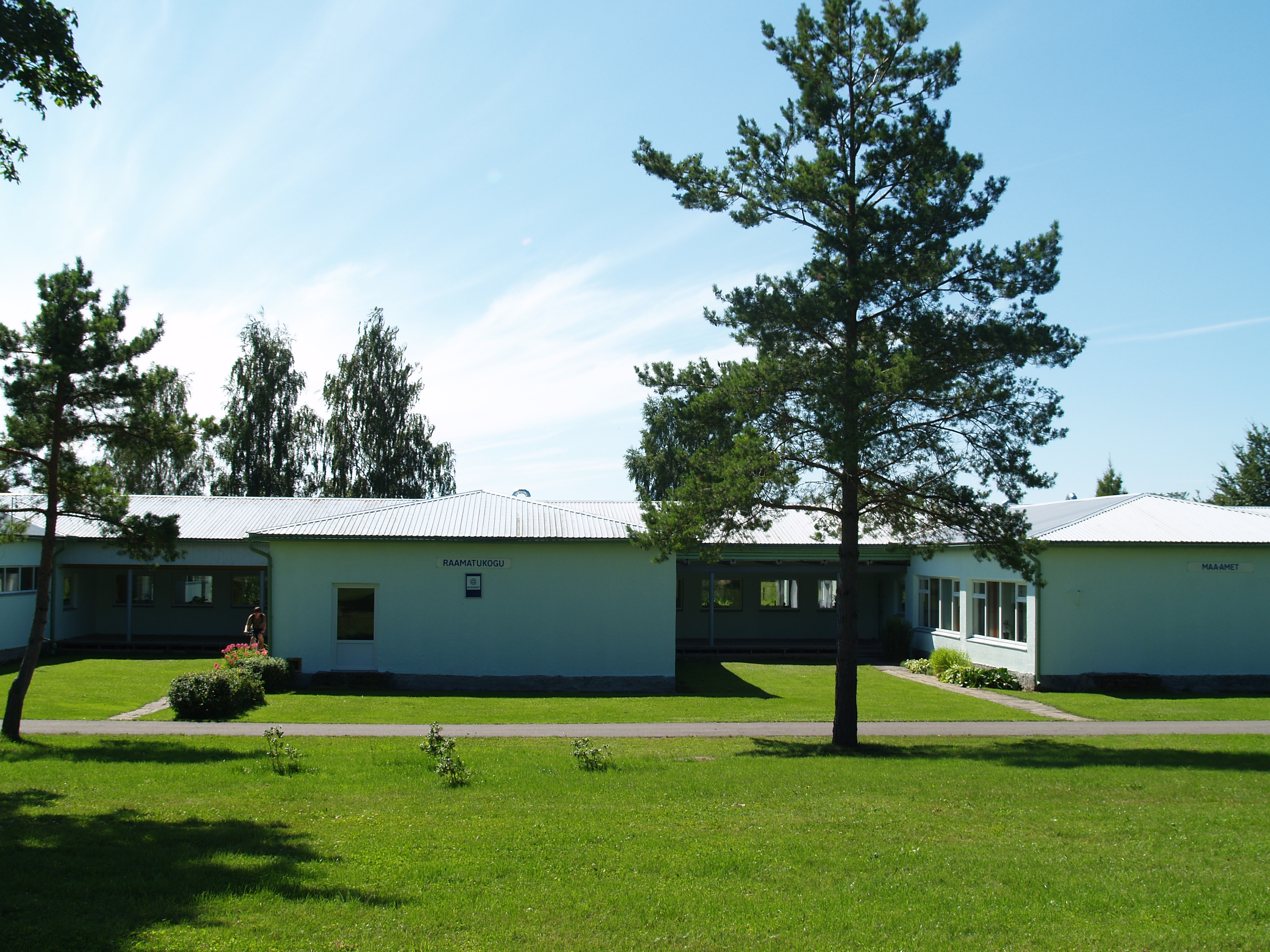 Liiva raamatukogu